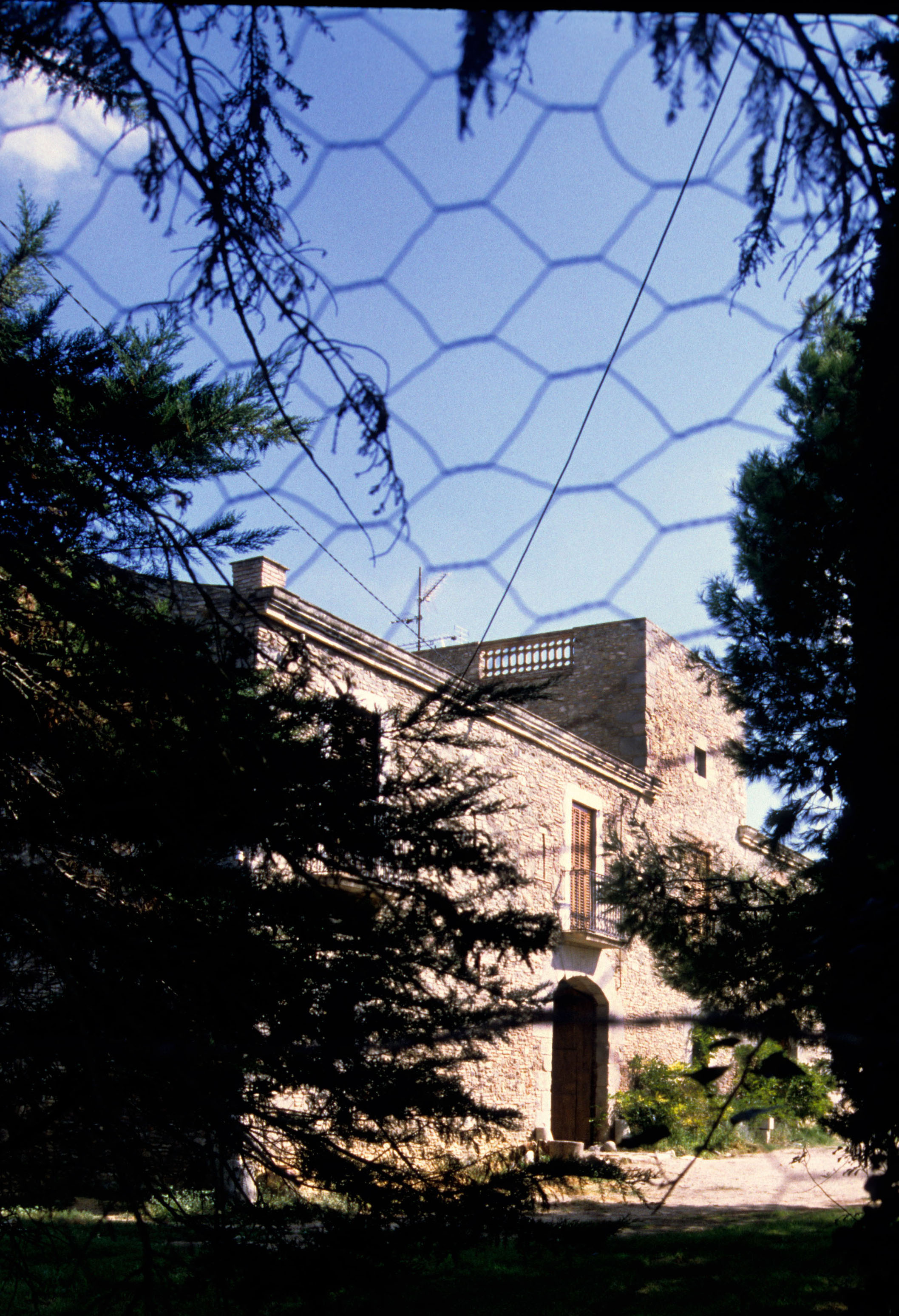 Castelló d'Espúries. Actual edifici de la que fou seu de la comanda templera.